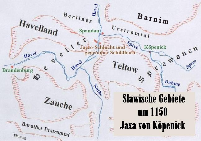 Karte zu Jaxa von Köpenick, um 1150